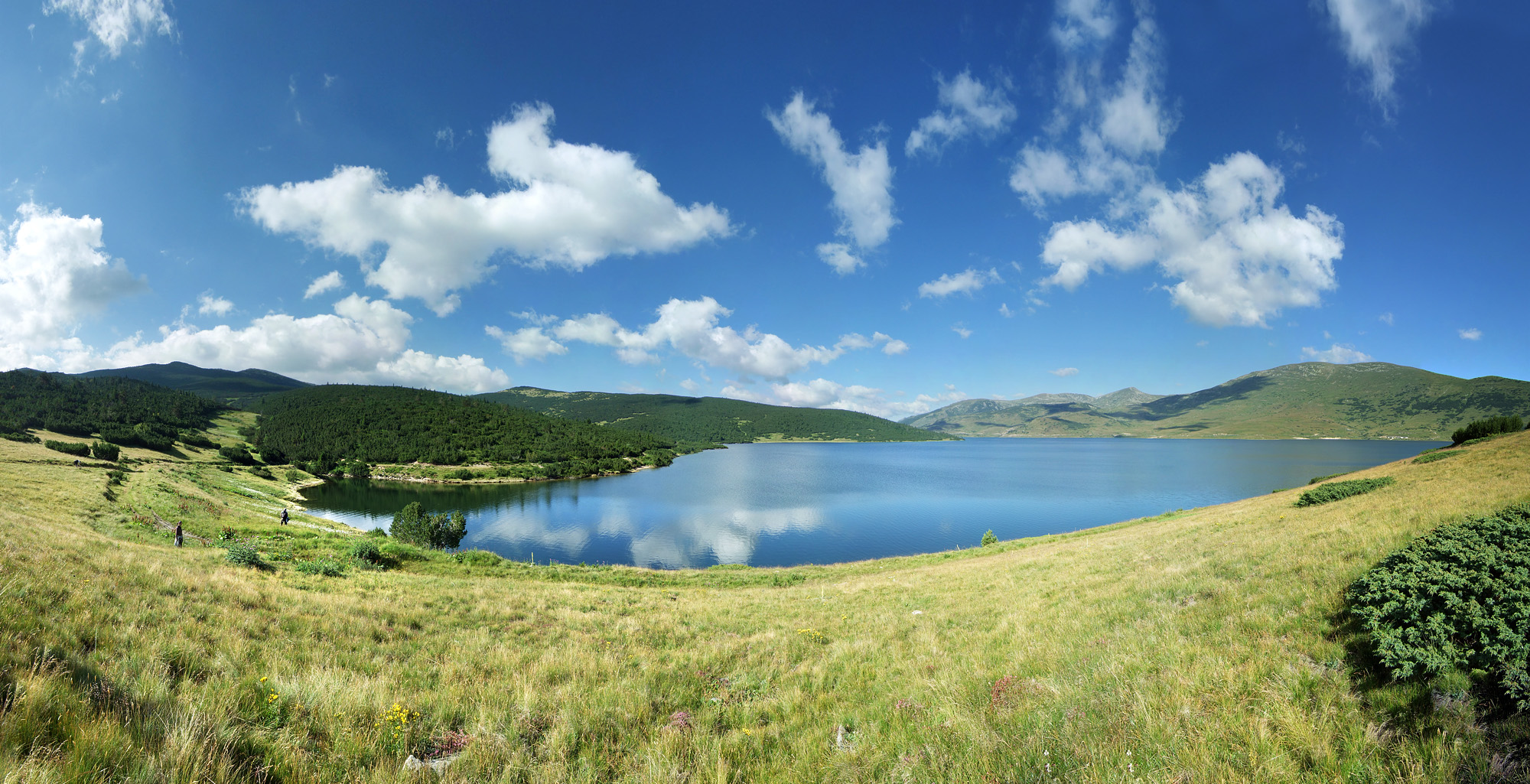 The Belmeken dam near Belmeken peak, Bulgaria